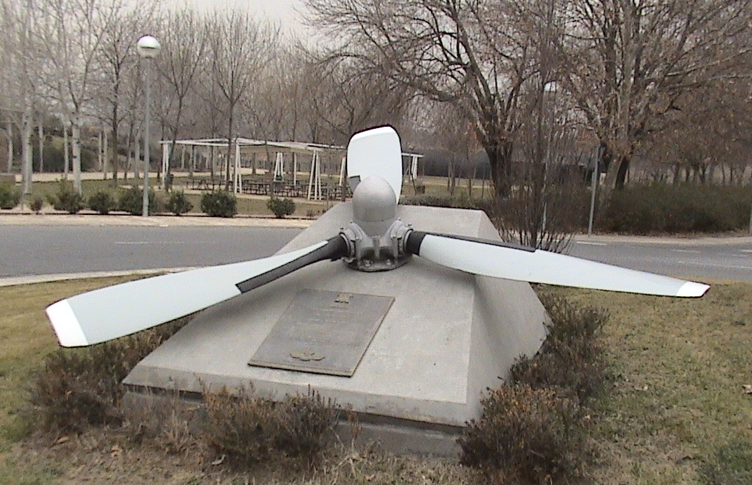 Monumento al Aeródromo de Barberán y Collar de Alcalá de Henares (Comunidad de Madrid - España). Hélice de avión y una placa en la que se puede leer: "Este campus universitario fue aeródromo de Alcalá de Henares, ciudad pionera de la aviación española. 1913 - 1965 En recuerdo. 2003 primer centenario mundial de la aviación. Asociación de Amigos de la Universidad de Alcalá".